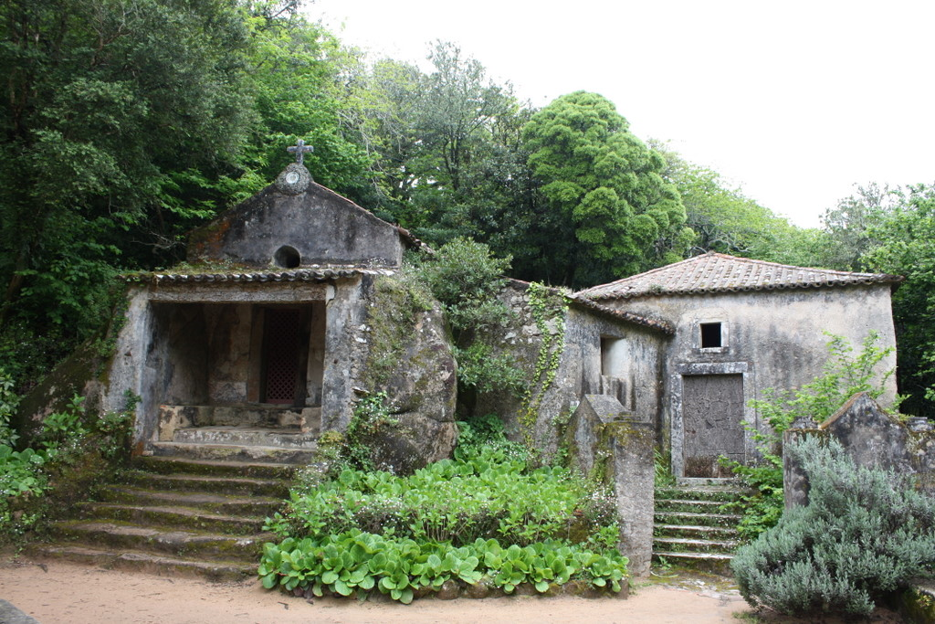 Convento dos Capuchos This file was uploaded for Wiki Loves Monuments in Portugal with the unique identifier 72838.